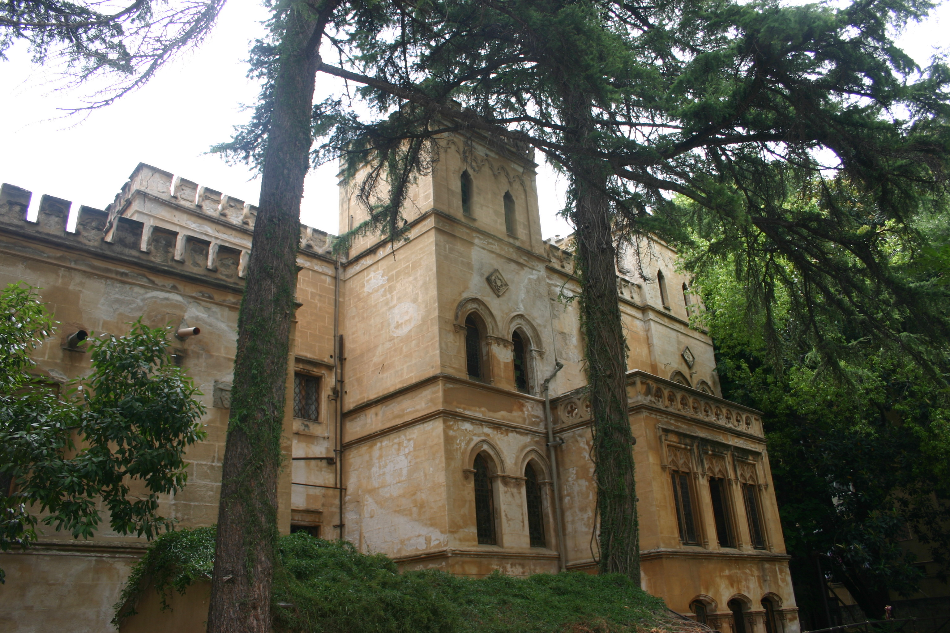 edificio